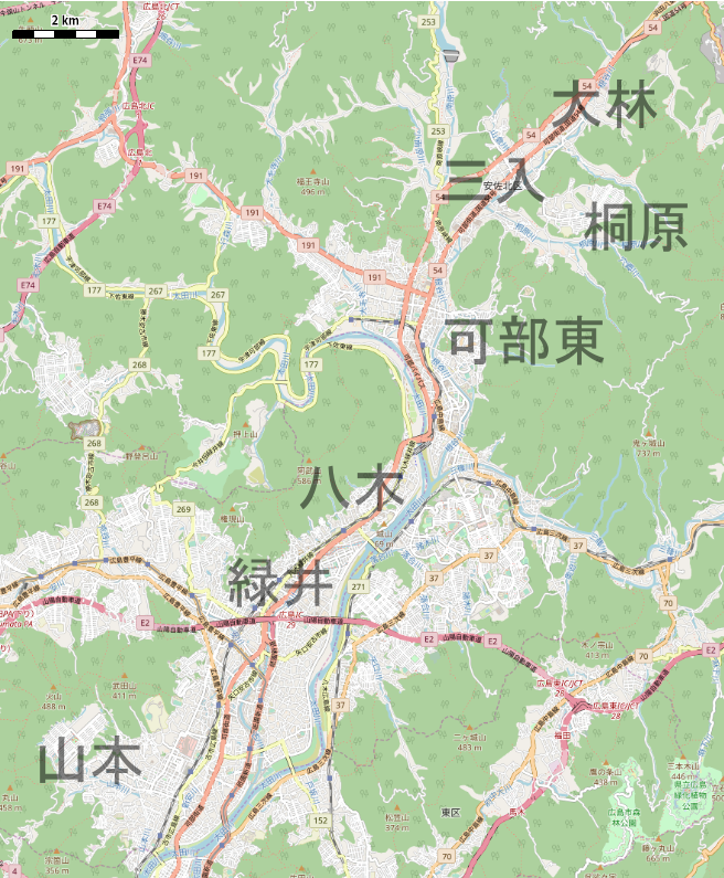 2014年広島土砂災害 詳細位置図 This map may be incomplete, and may contain errors. Don't rely solely on it for navigation.